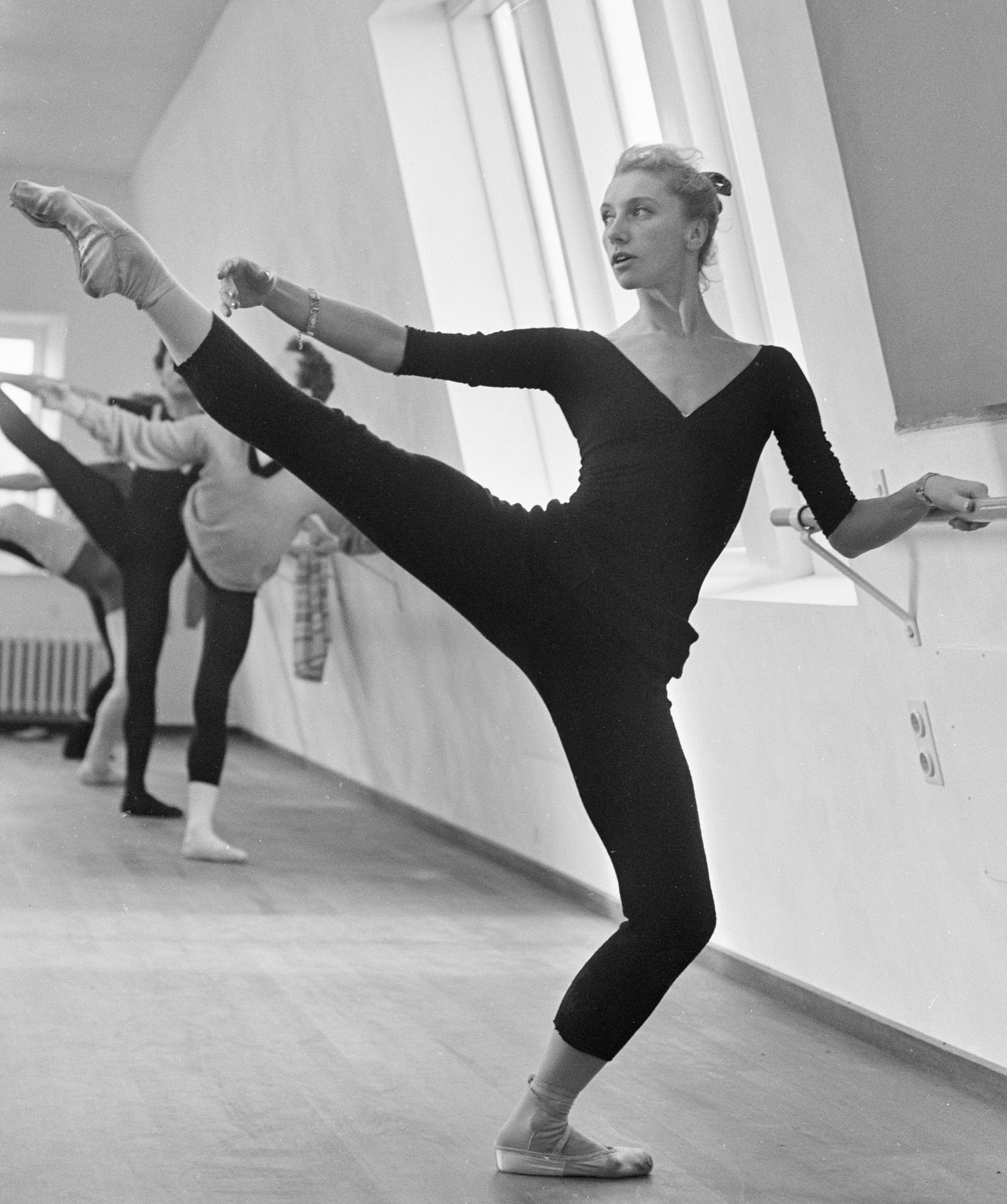 Russische balletgroep oefent in Stadsschouwburg, op voorgrond ballerina Osipenka